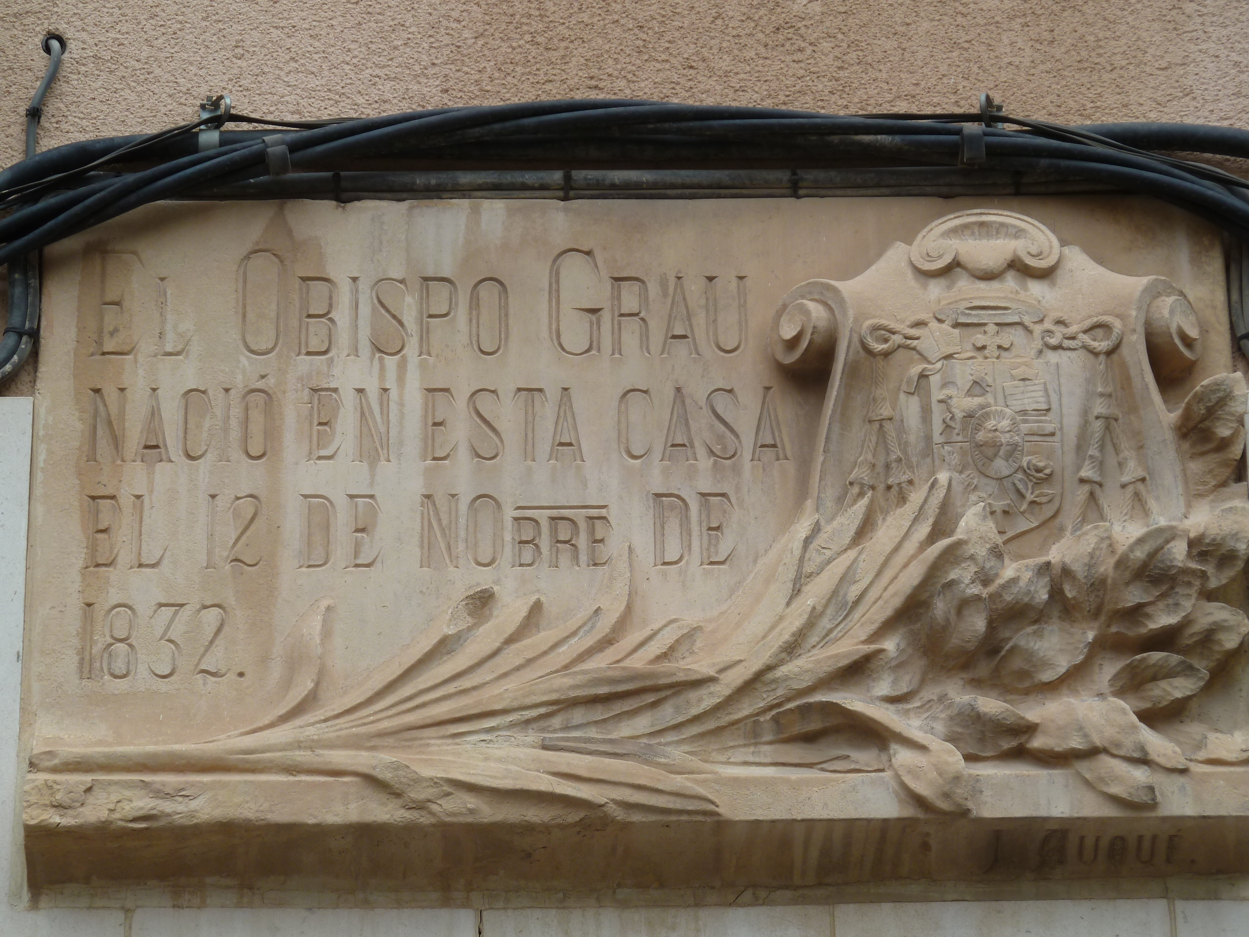 Reus